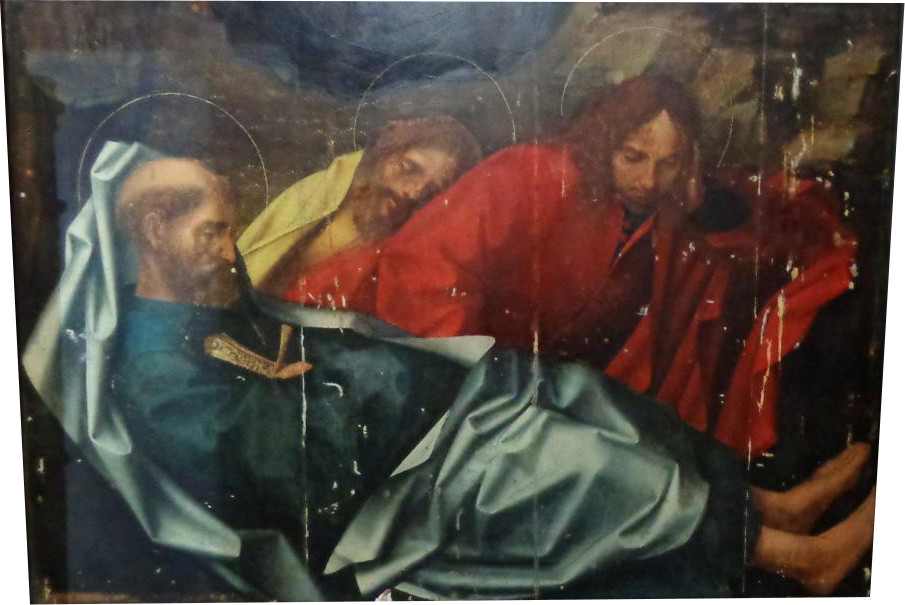 Trabalho de restauro do Laboratório José de Figueiredo.